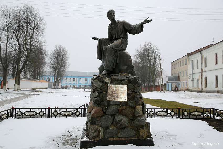 Мсціслаў. Помнік Пятру Мсціслаўцу